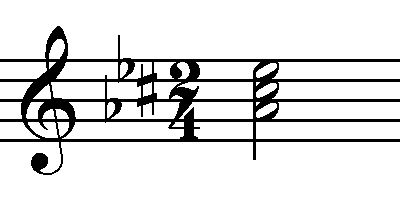 zenei módosítójelek - példa 11